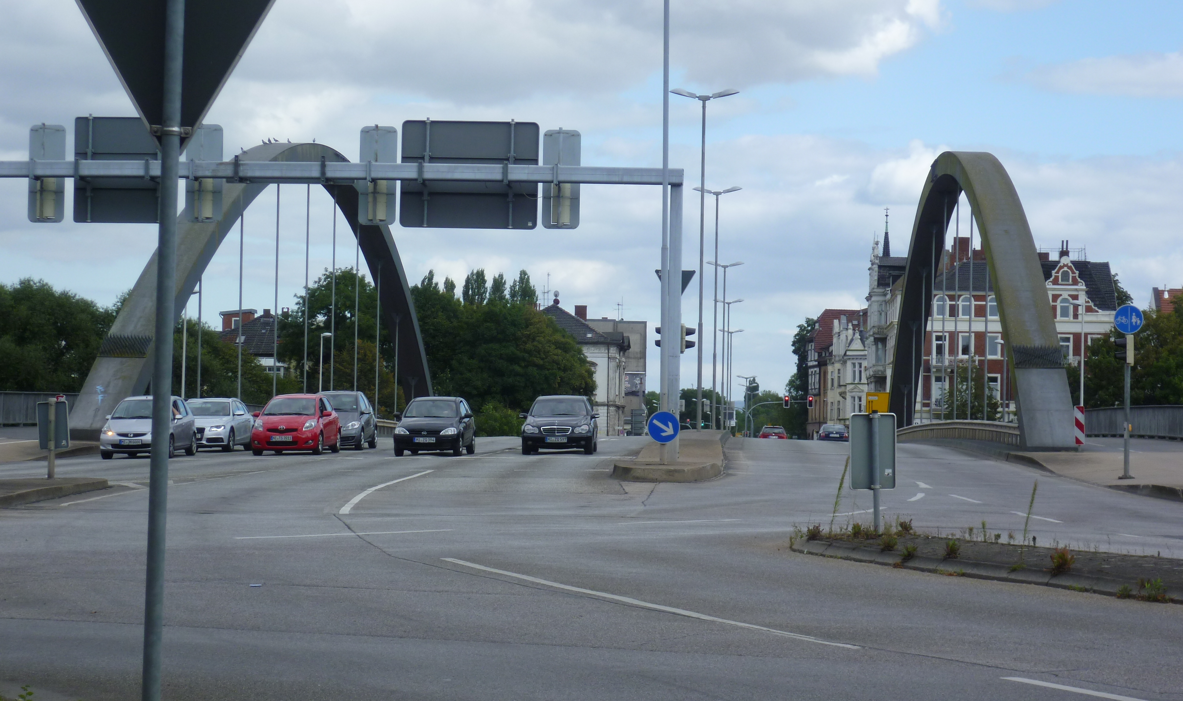 Die Weserbrücke in Minden. 6 Spuren der Straße.